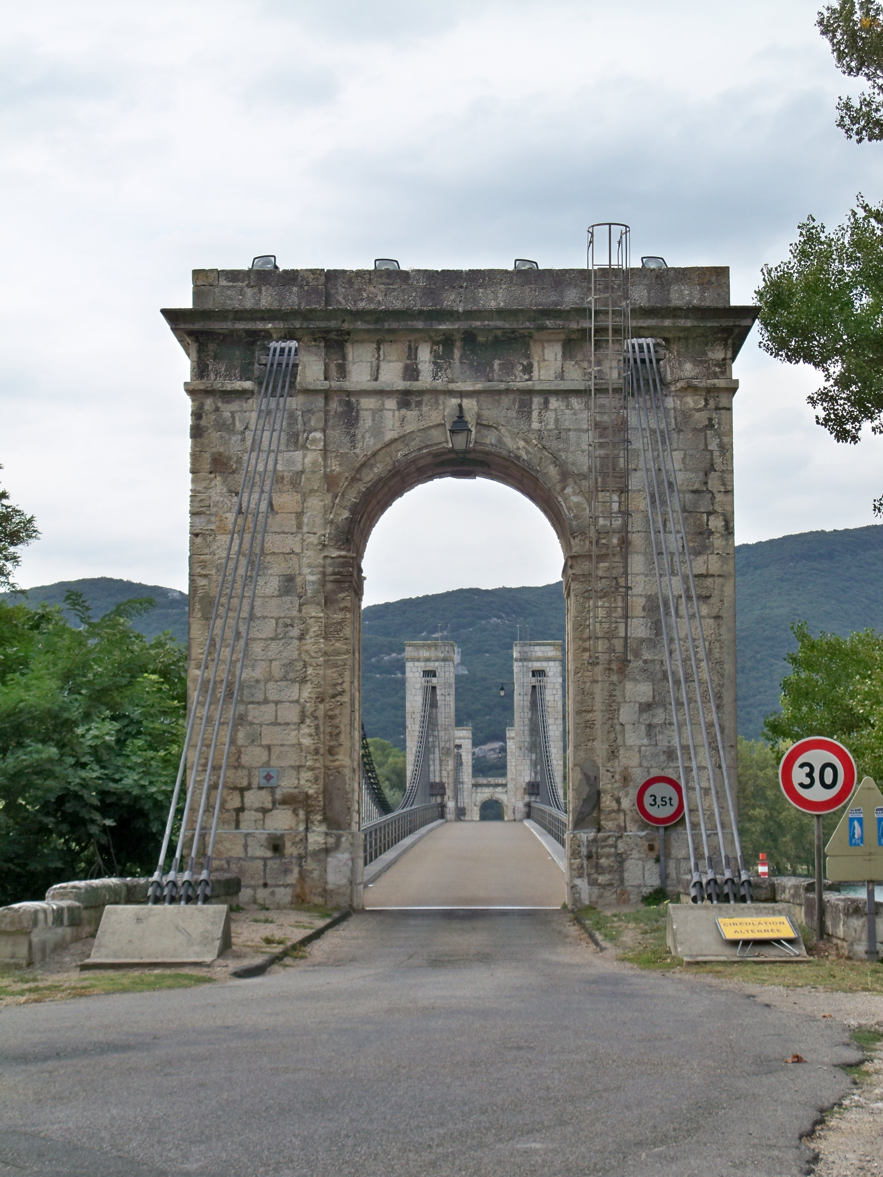 Pont du Robinet, C.D. 86J (Inscription, 1985) .